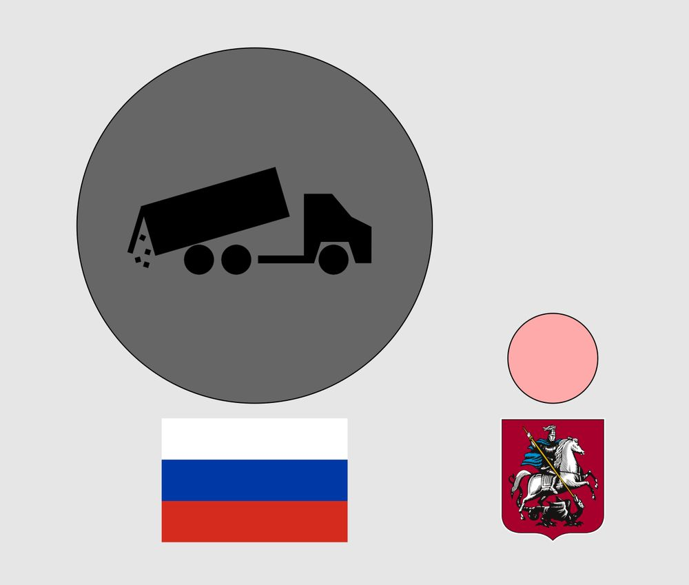 Сравнение размеров территории занятой свалками с размерами Москвы